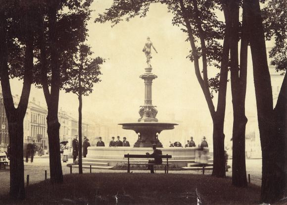 såningskvinnan